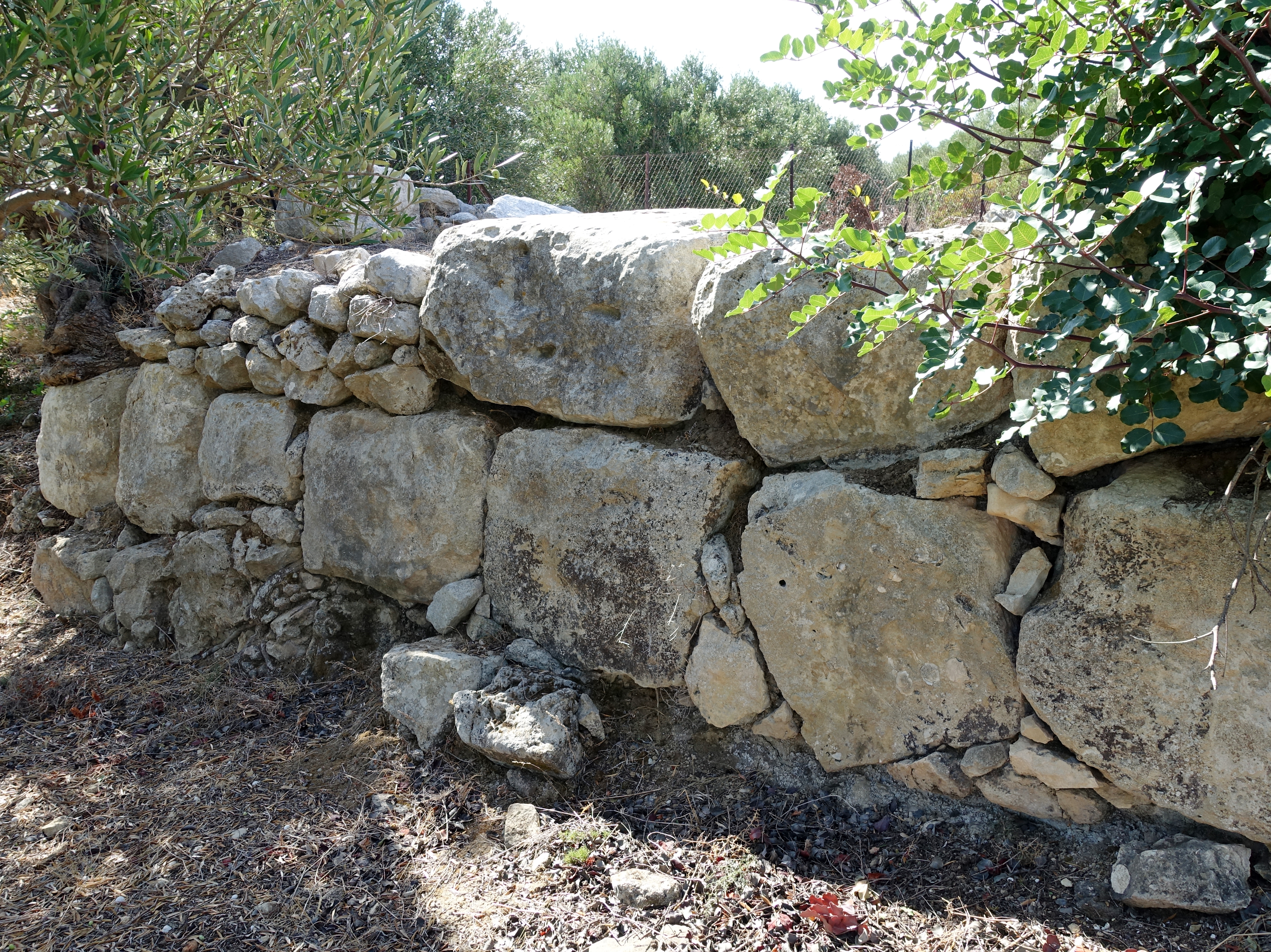 Minoische Villa von Achladia (Μινωική έπαυλη Αχλαδίων), Gemeinde Sitia, Kreta, Griechenland